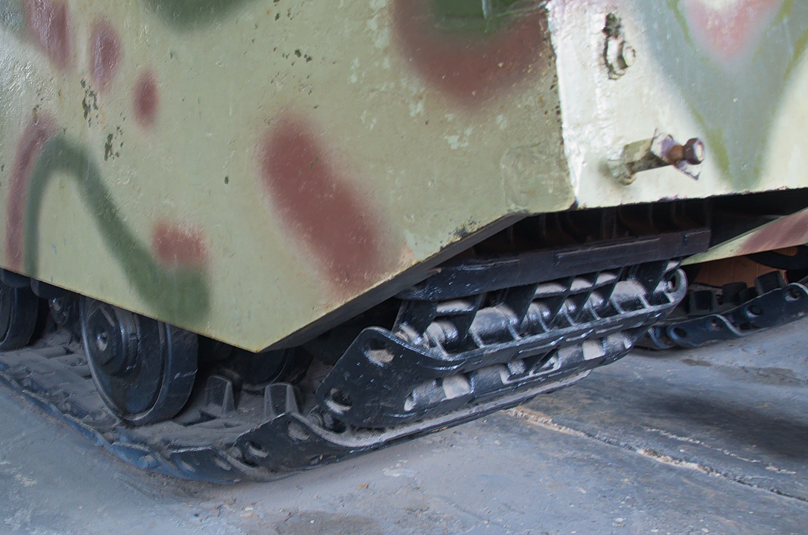 0637 - Moskau 2015 - Panzermuseum Kubinka